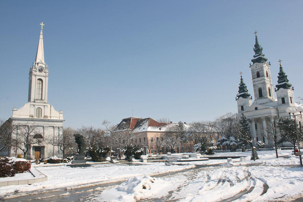 Центар Бечеја, Србија. Unknown bečej